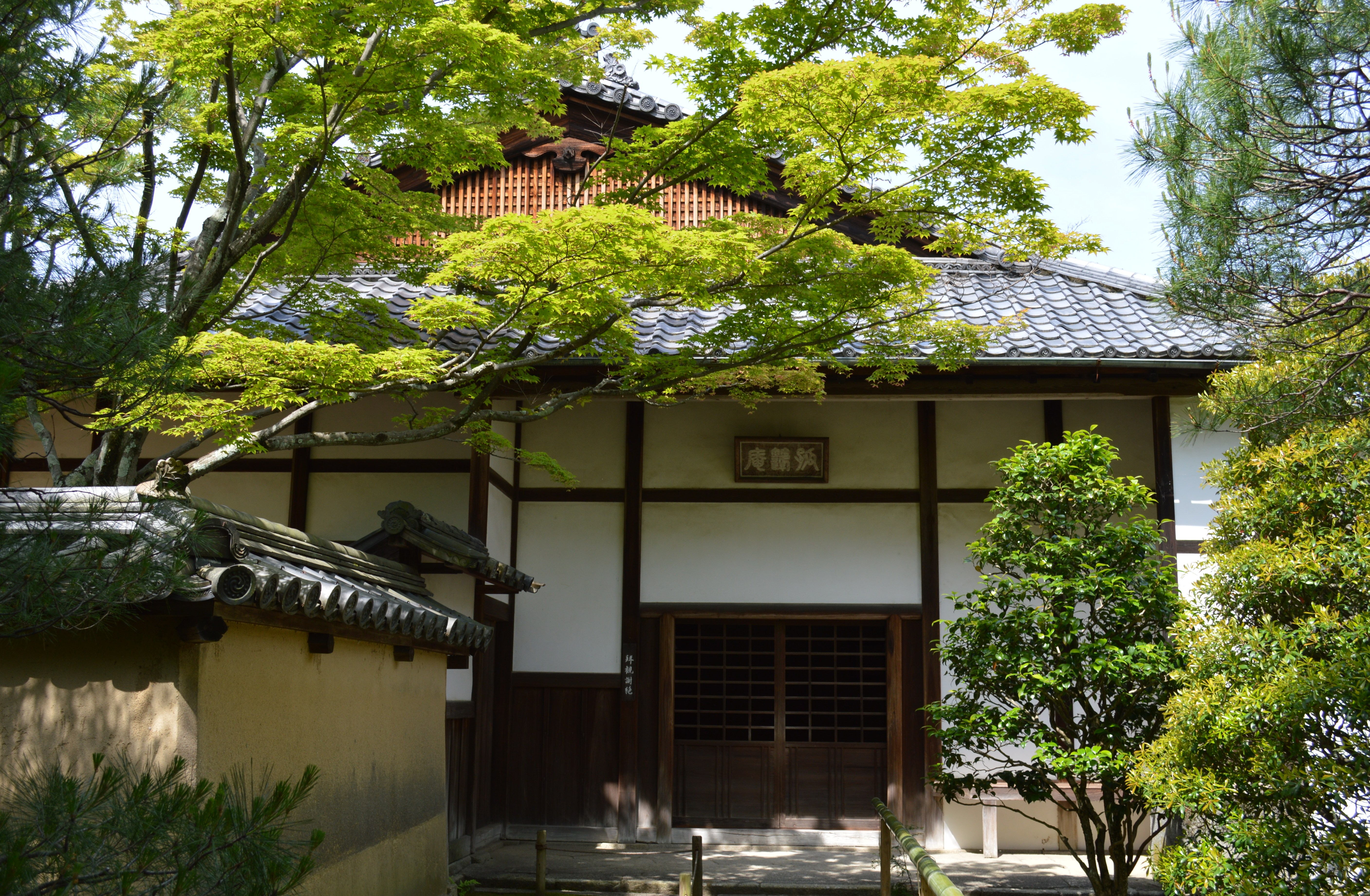 京都市北区紫野 臨済宗大徳寺派孤蓬庵（大徳寺塔頭） 方丈